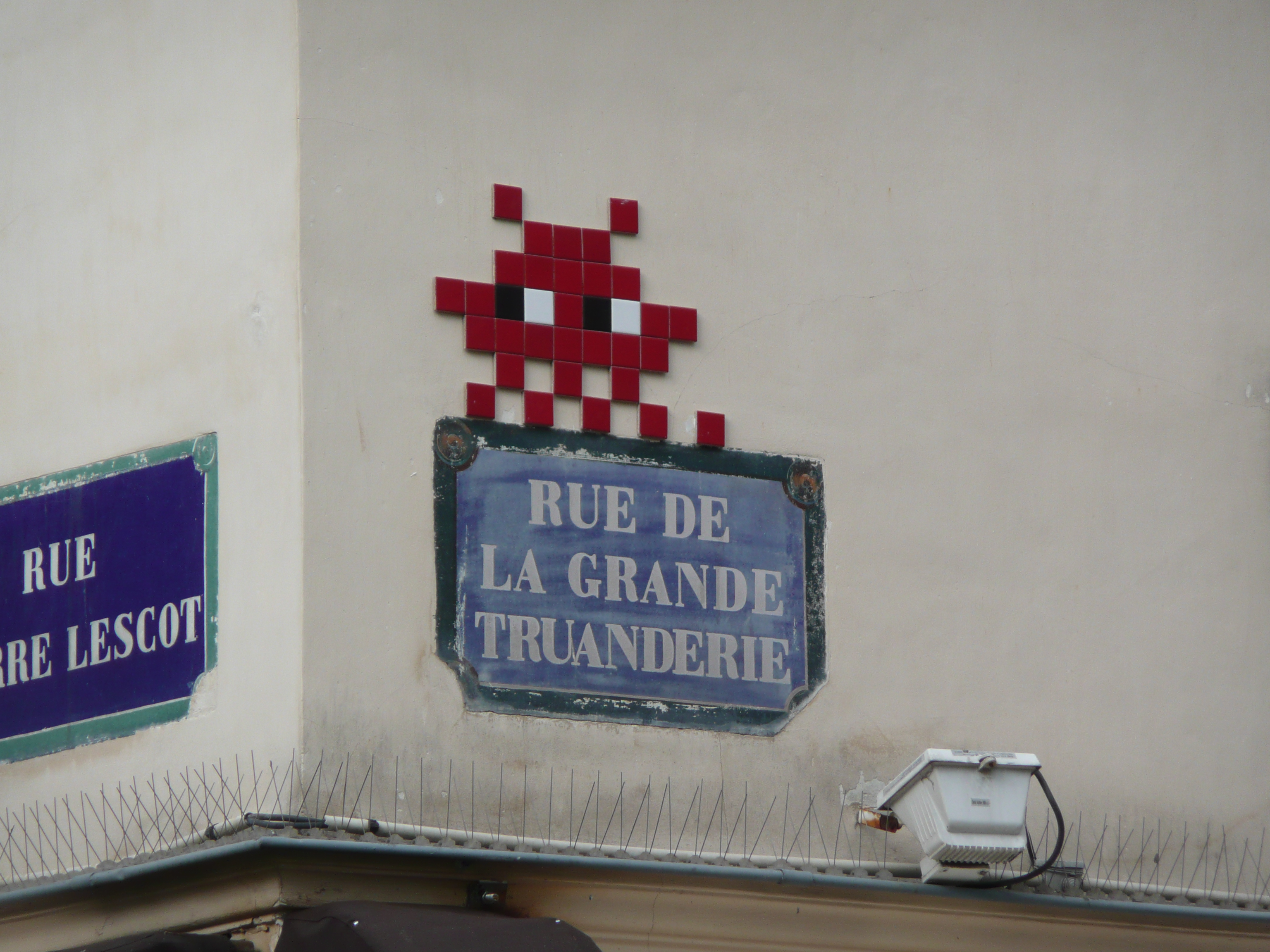 Rue de la Grande-Truanderie (Paris)